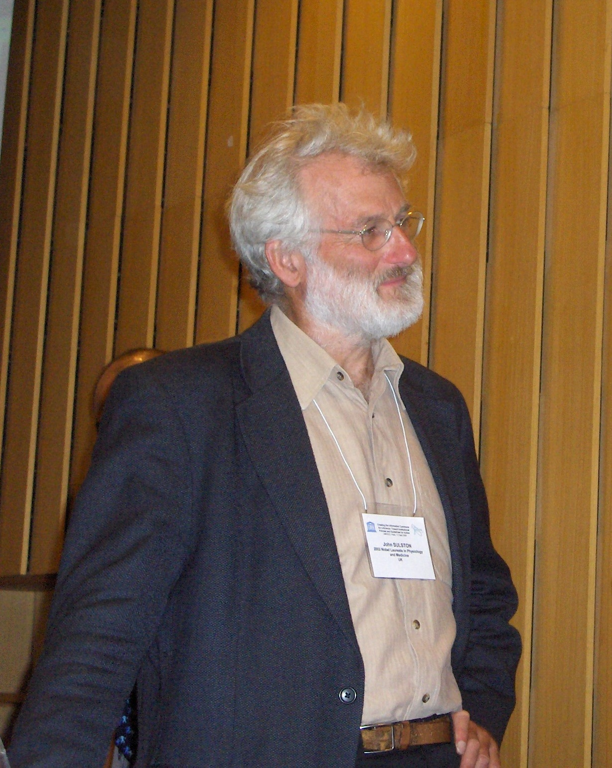 John E. Sulston